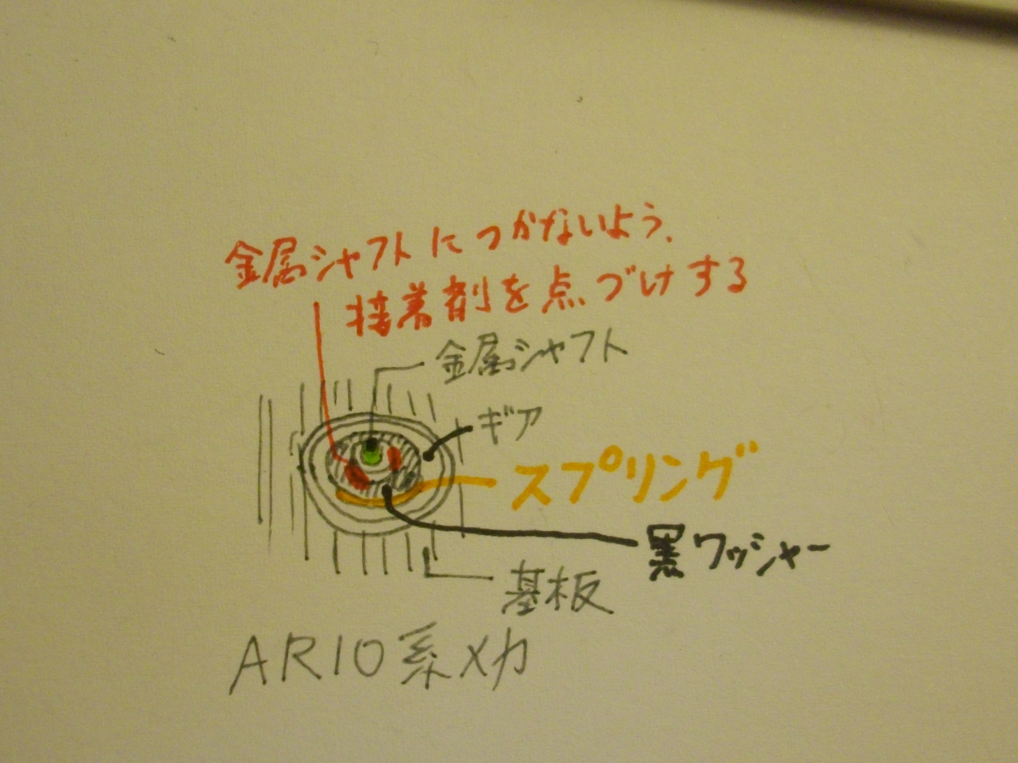 AR10系メカの外れた圧着ばねの接着方法